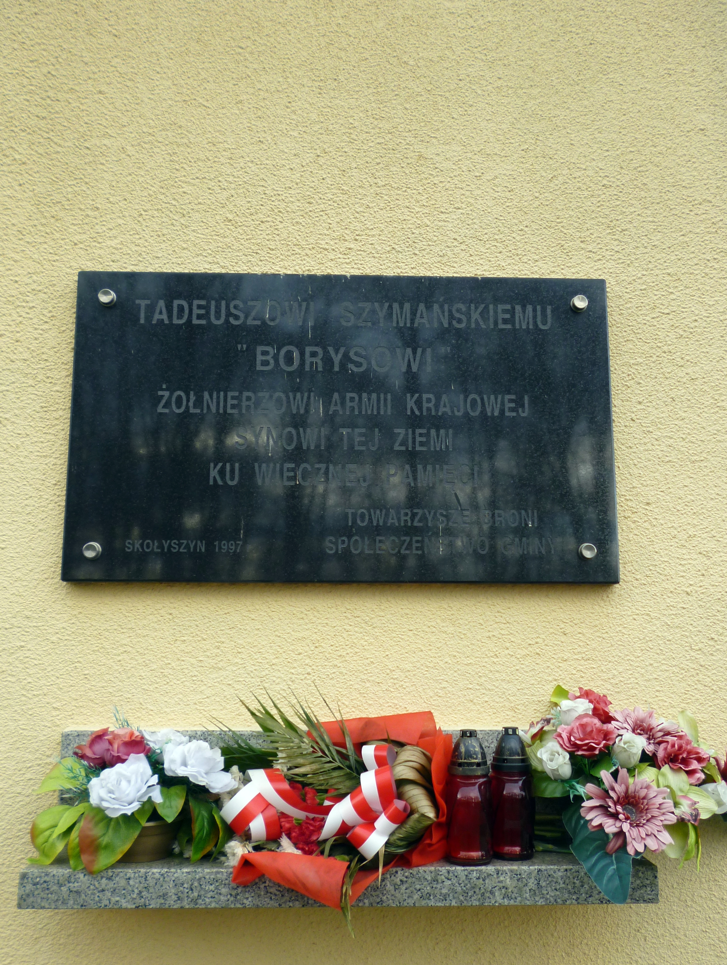 Tablica upamiętniająca żołnierza Armii Krajowej Tadeusza Szymańskiego ps "Borys" w Skołyszynie